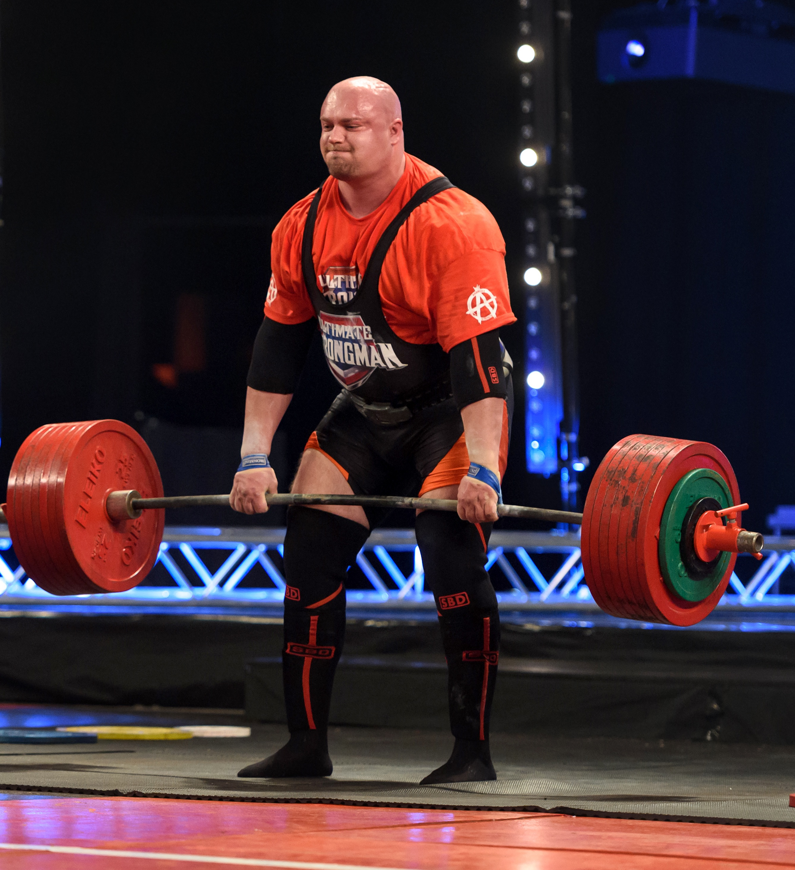 Kreuzheben 400kg Deutscher Rekord